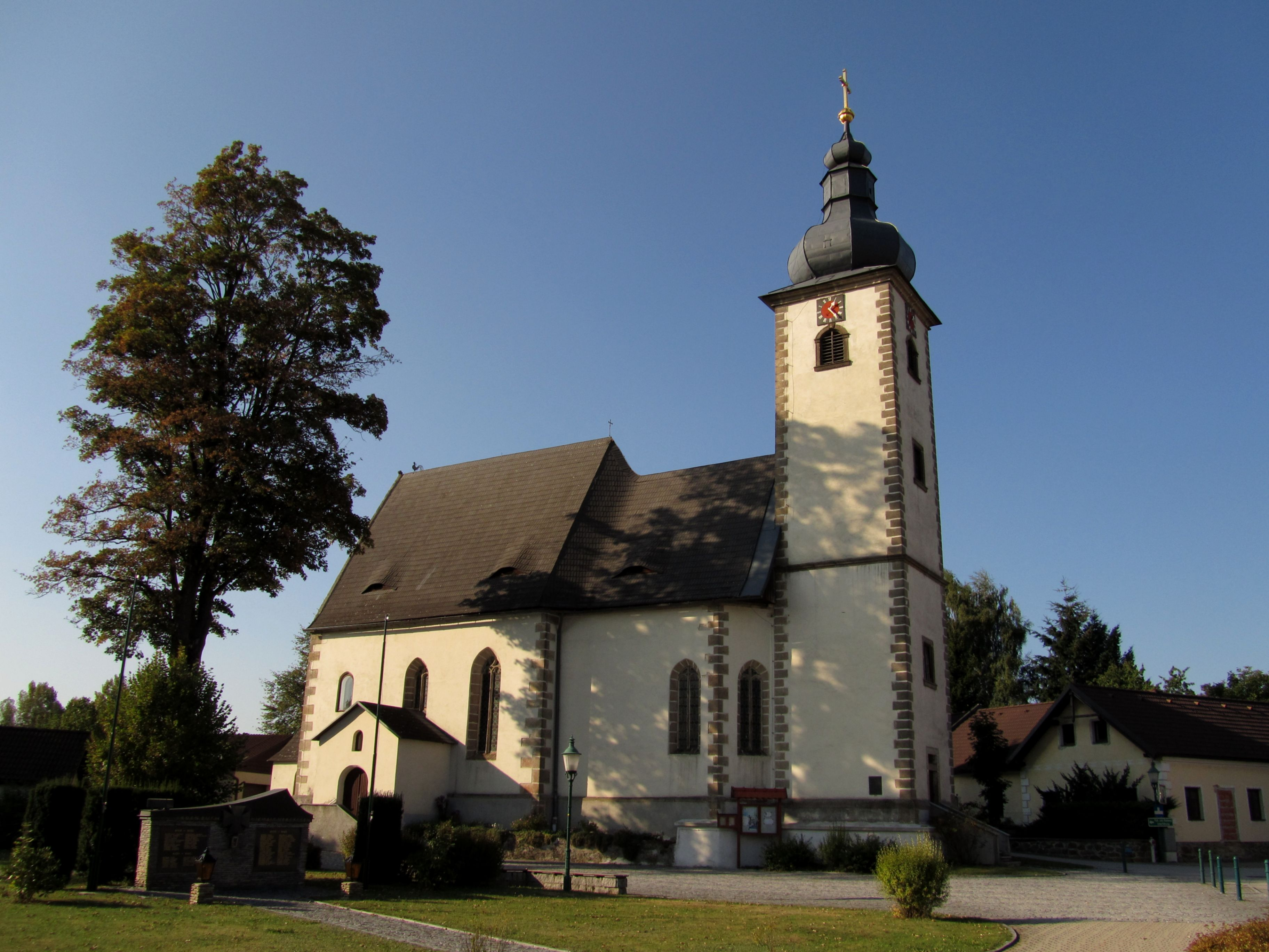 Kath. Pfarrkirche hll. 14 Nothelfer, Dietmanns